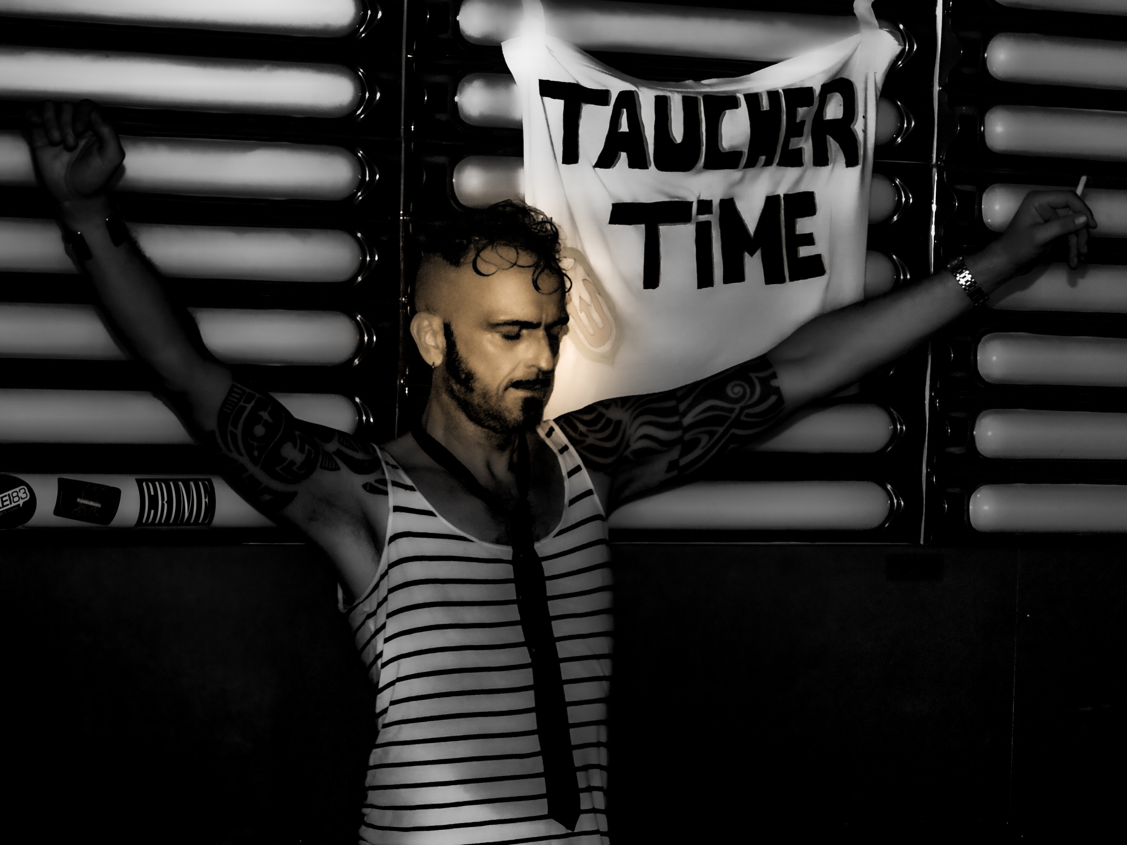 "TAUCHER TIME"